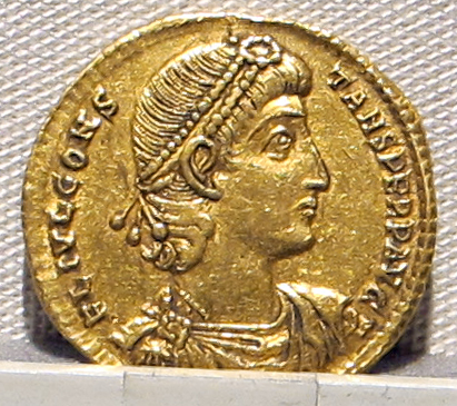 Palazzo Massimo alle Terme